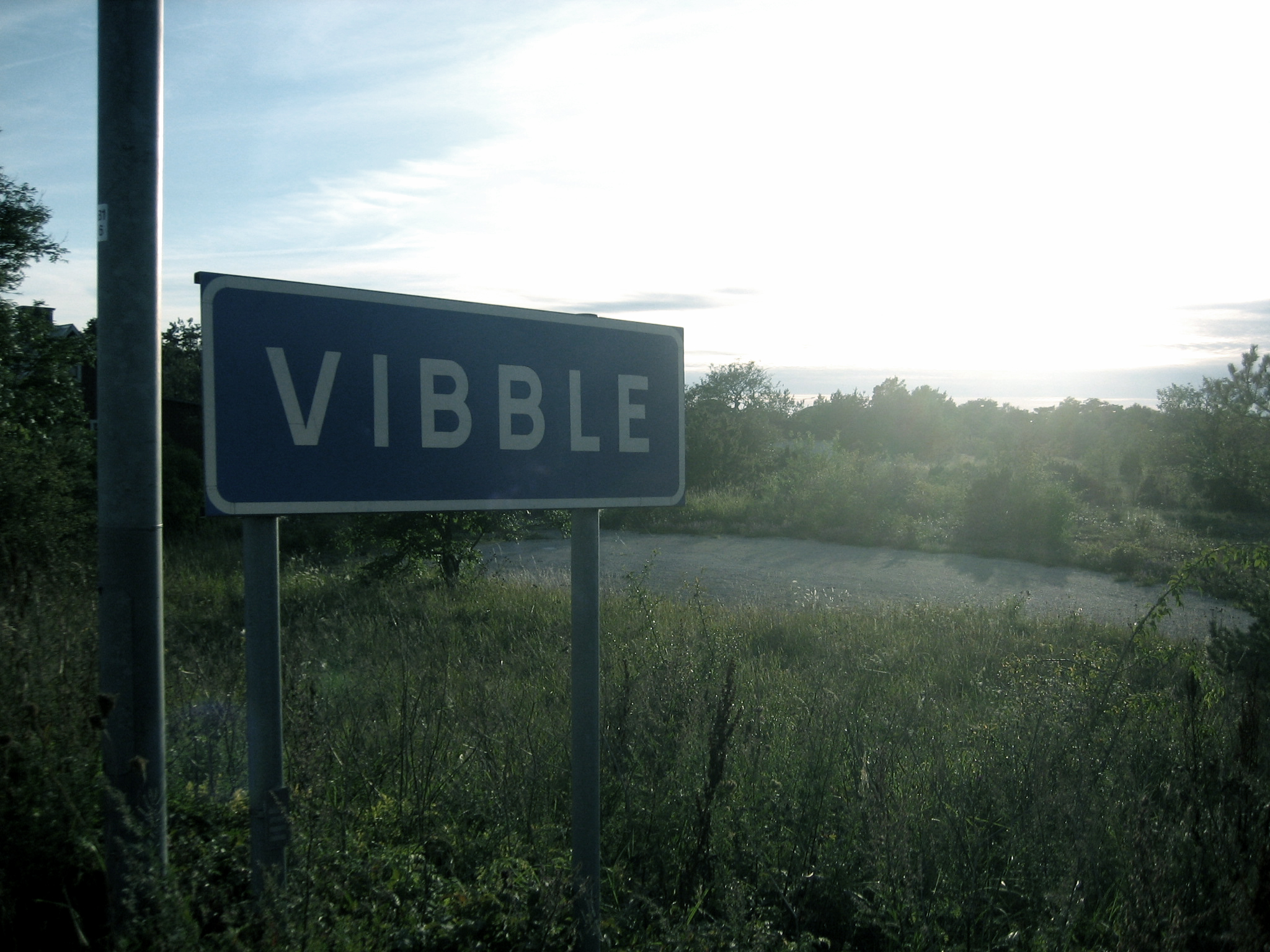 Skylt: "Vibble"